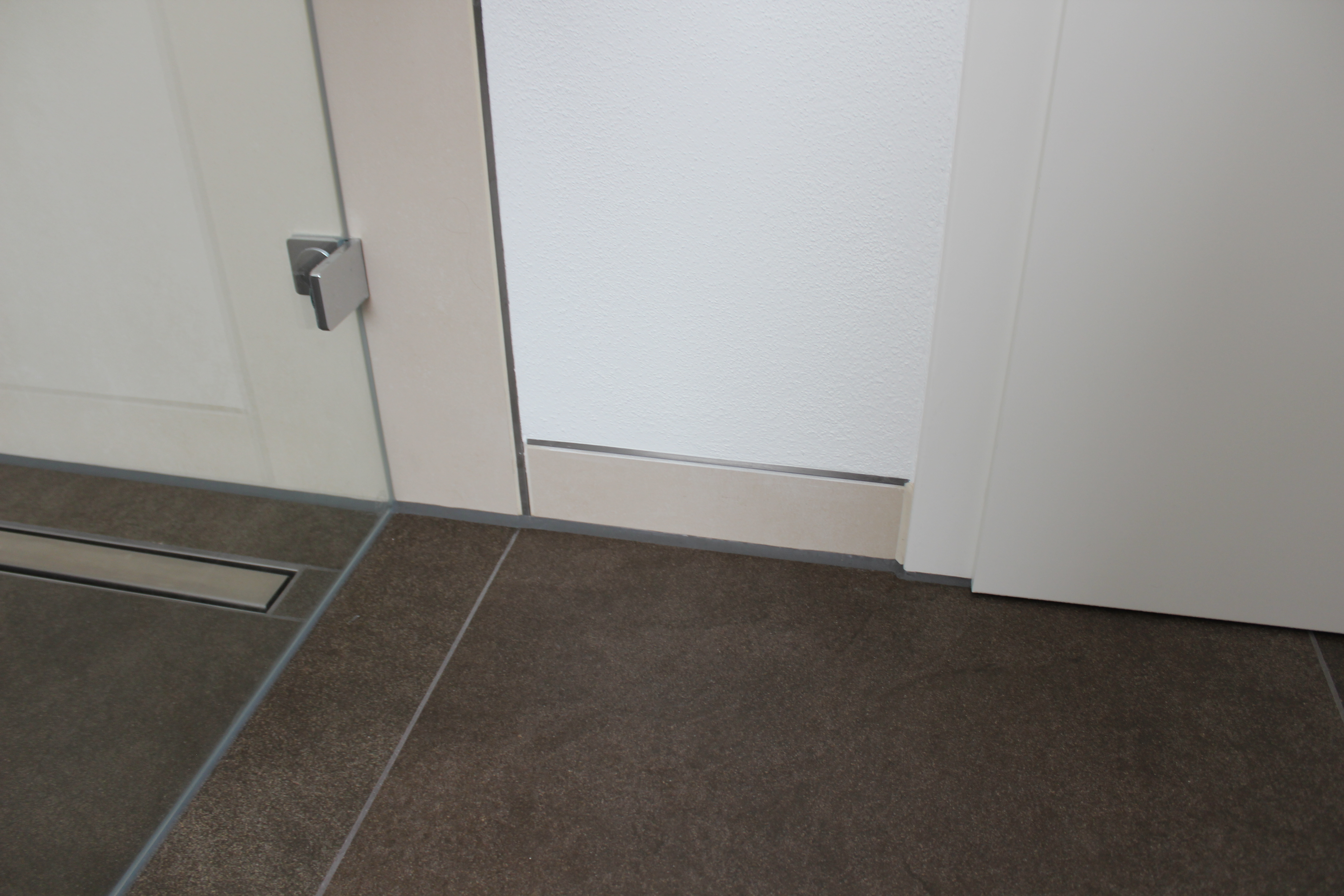 Detail im gefliesten Bad: Übergang zwischen Fliesen und verputzter Wand durch Schienen. Rechts die Tür, links die deckenhoch geflieste Dusche mit Glas-Duschabtrennung.